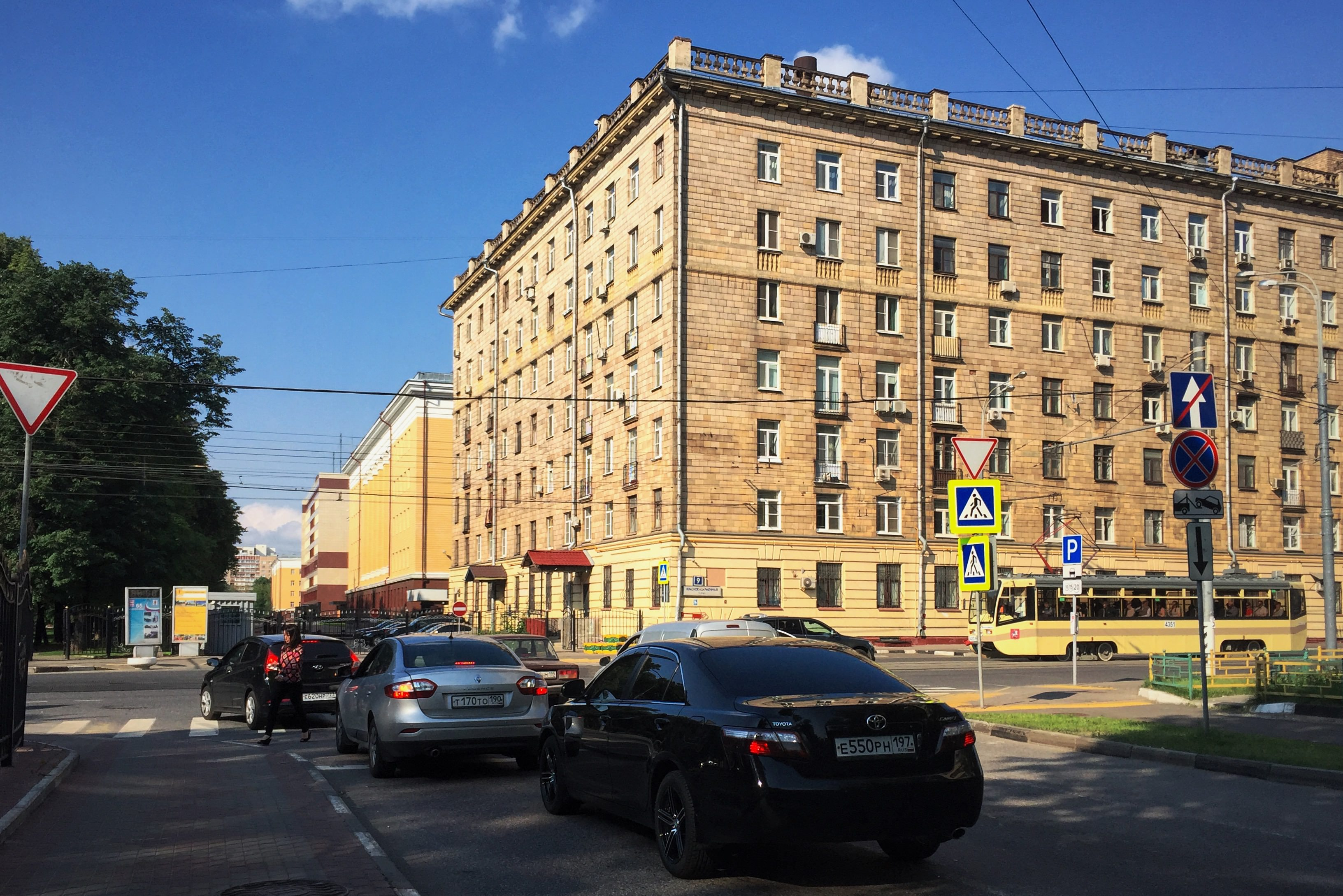 Красноказарменная улица дом 9, пересечение с проездом Краснокурсантской площади